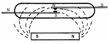 Keelrelee magnetväljas